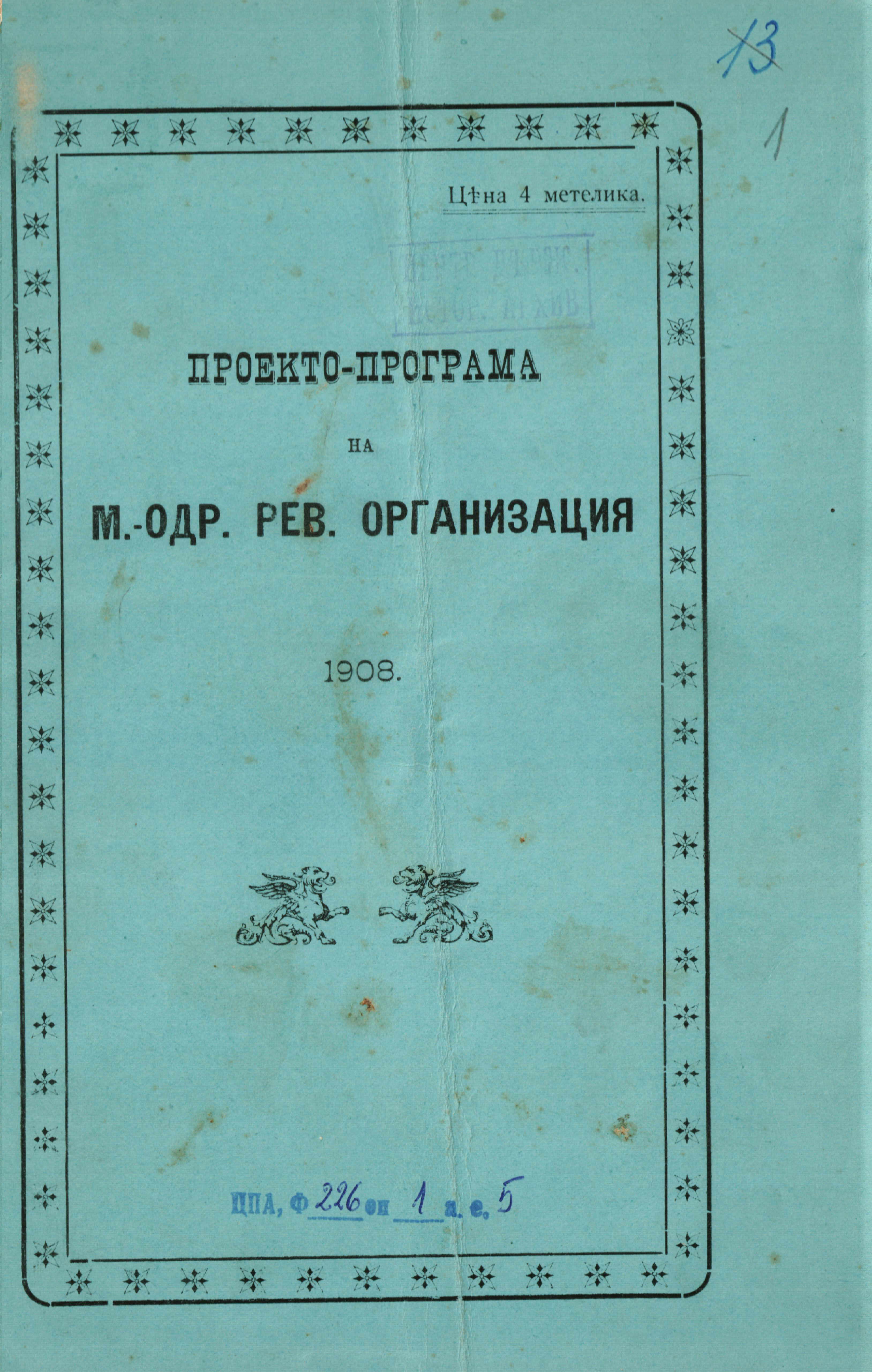 Програмни искания на Македоно-одринската революционна организация, проект изработен от Серския, Солунския и Струмишкия революционен окръг.)